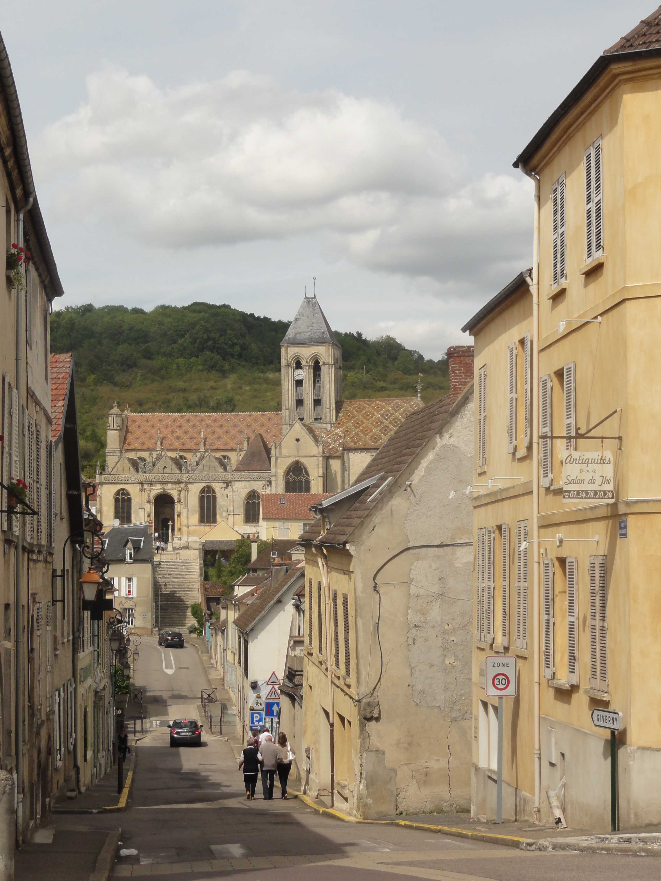 Vue depuis la place du village.